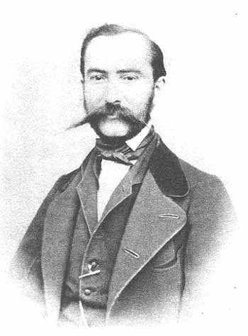 Ján Kalinčiak, Slovak writer (1822-1871)